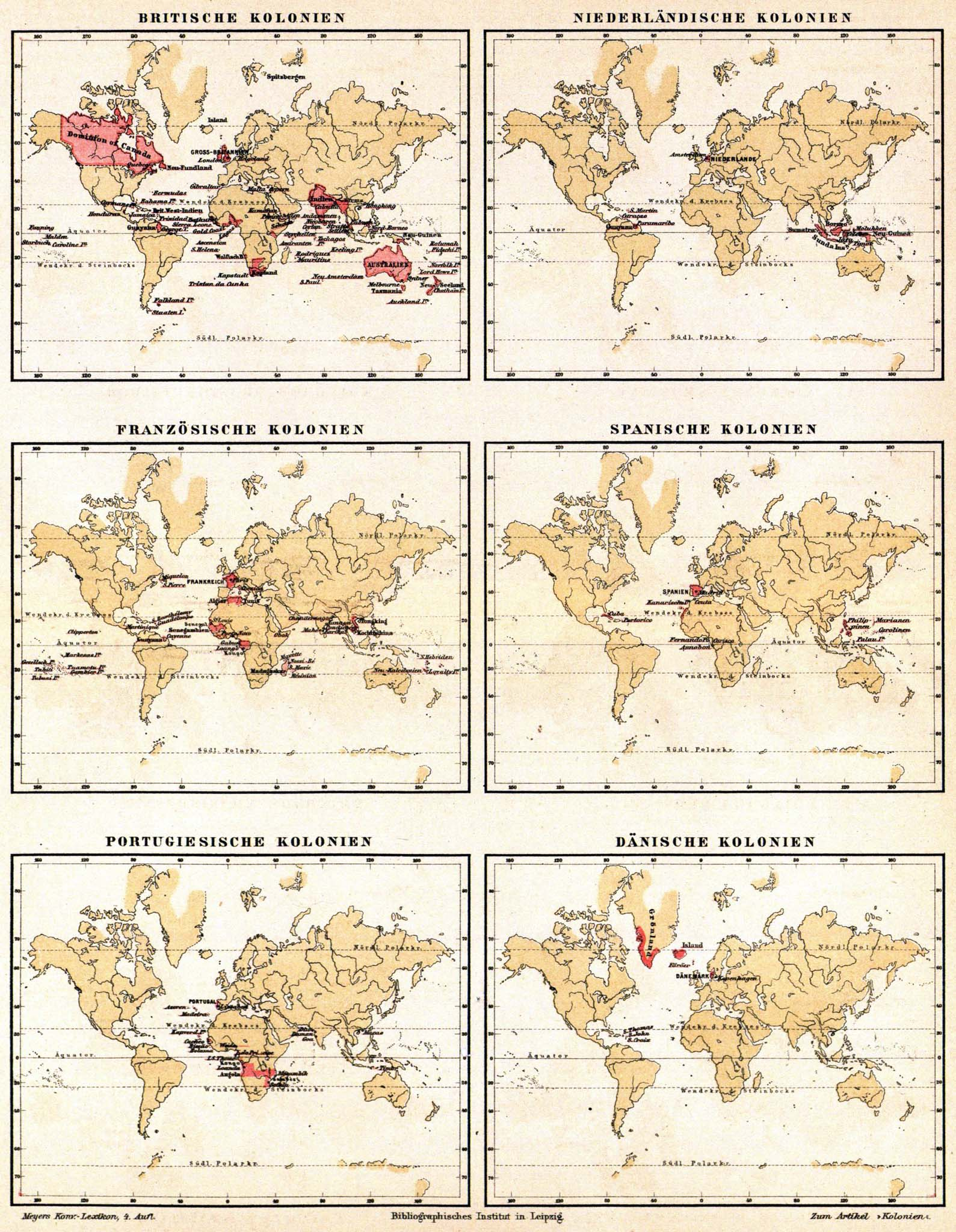 Kartenblatt zum Artikel „Kolonien“